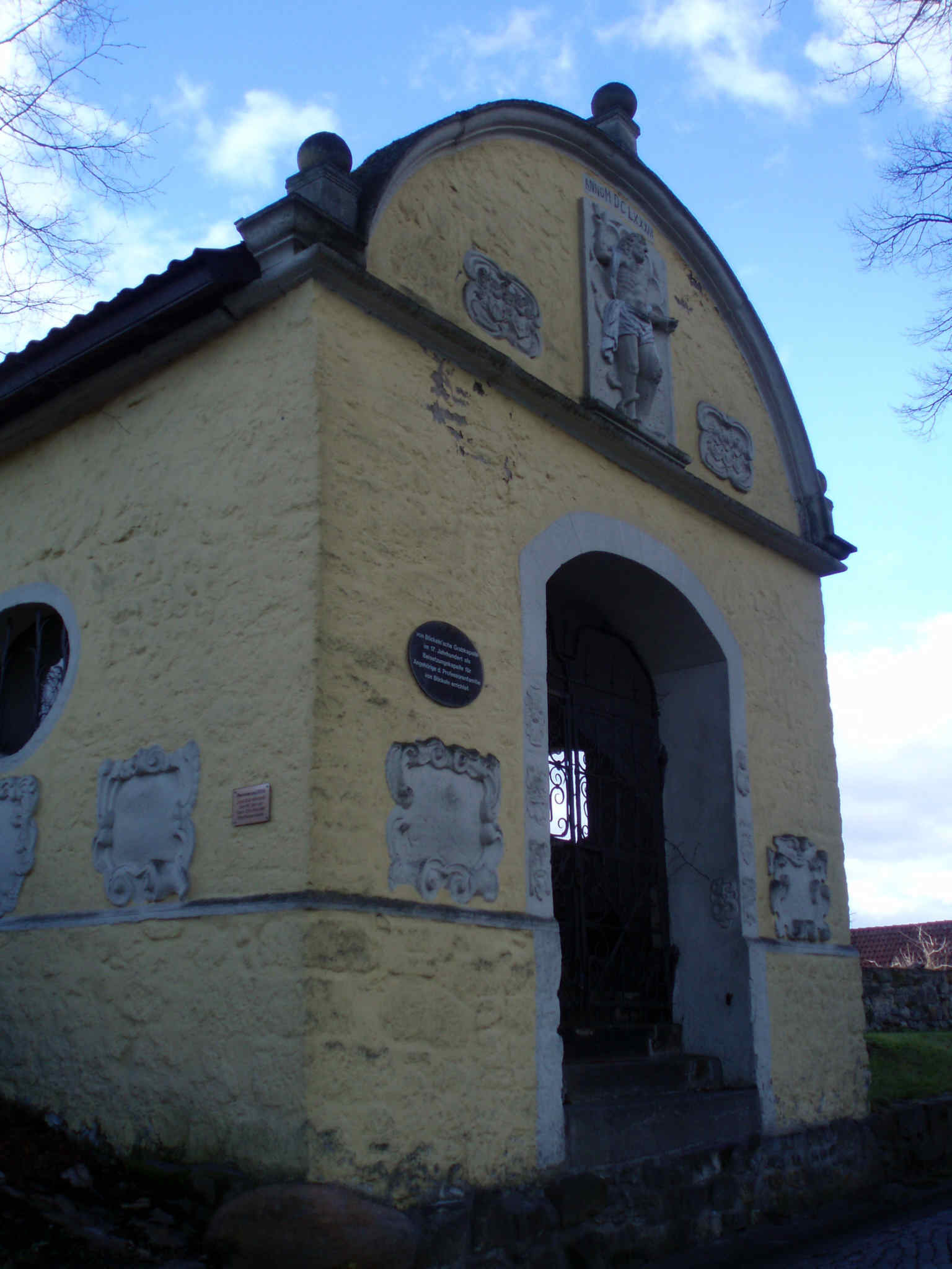 von Böckelnsche Grabkapelle in Helmstedt